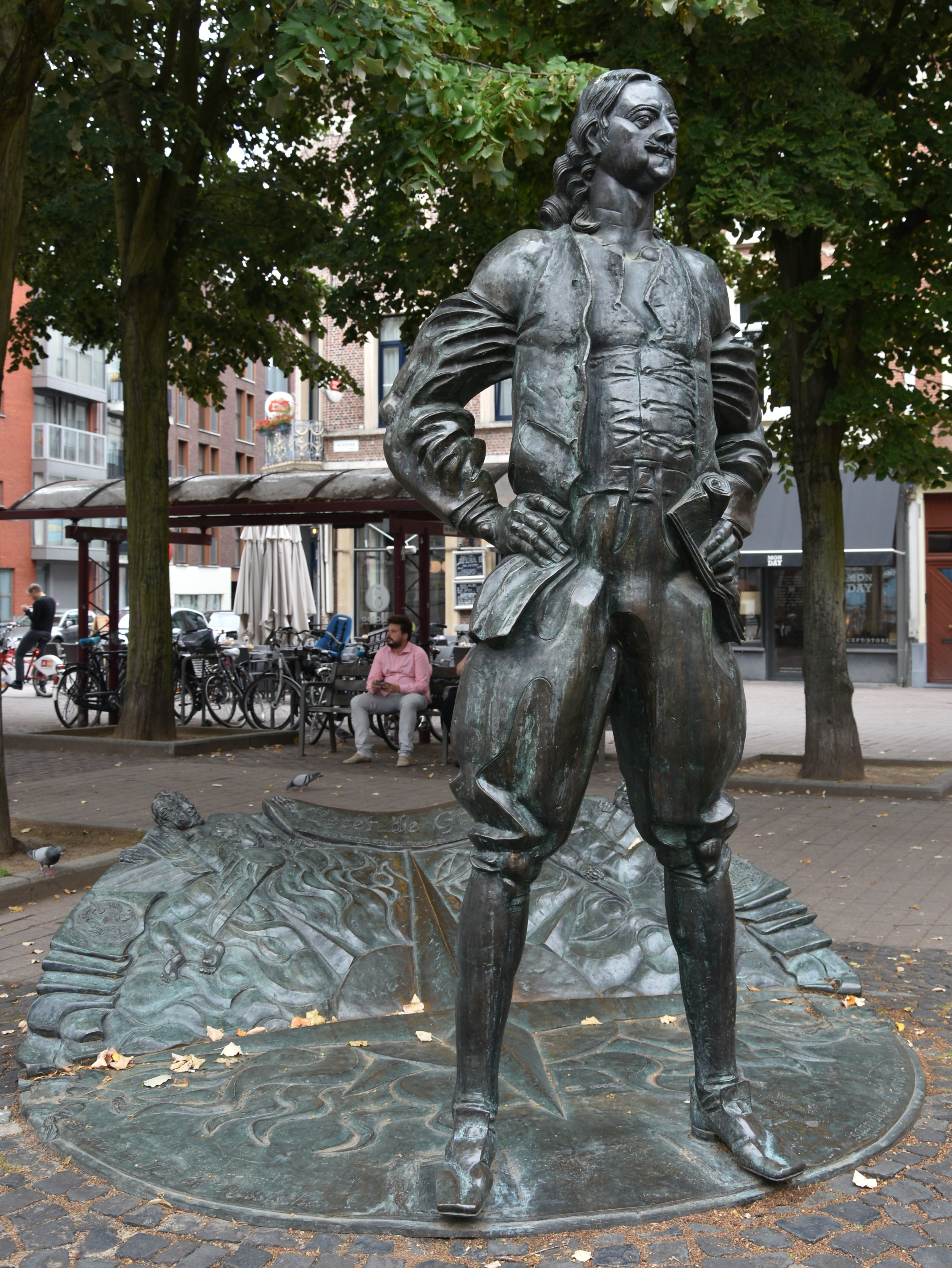 Georgy Frangulyan (1945) Peter de Grote Kloosterplein Antwerpen 19-08-2018 This photo of immovable heritage has been taken in the Flemish Region